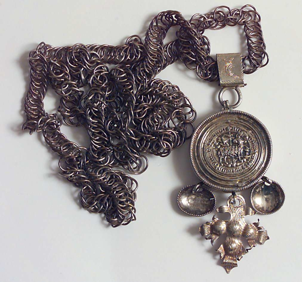 Agnus dei eller brudedaler med bilde av Guds lam og innskrift: AGNUS DEI QVITOLLIT PECCATA MUNDI. Innkjøpt av Nordiska museet i Norge i 1886. Foto Anne-Lise Reinsfelt / Norsk Folkemuseum, NF1999-3351.